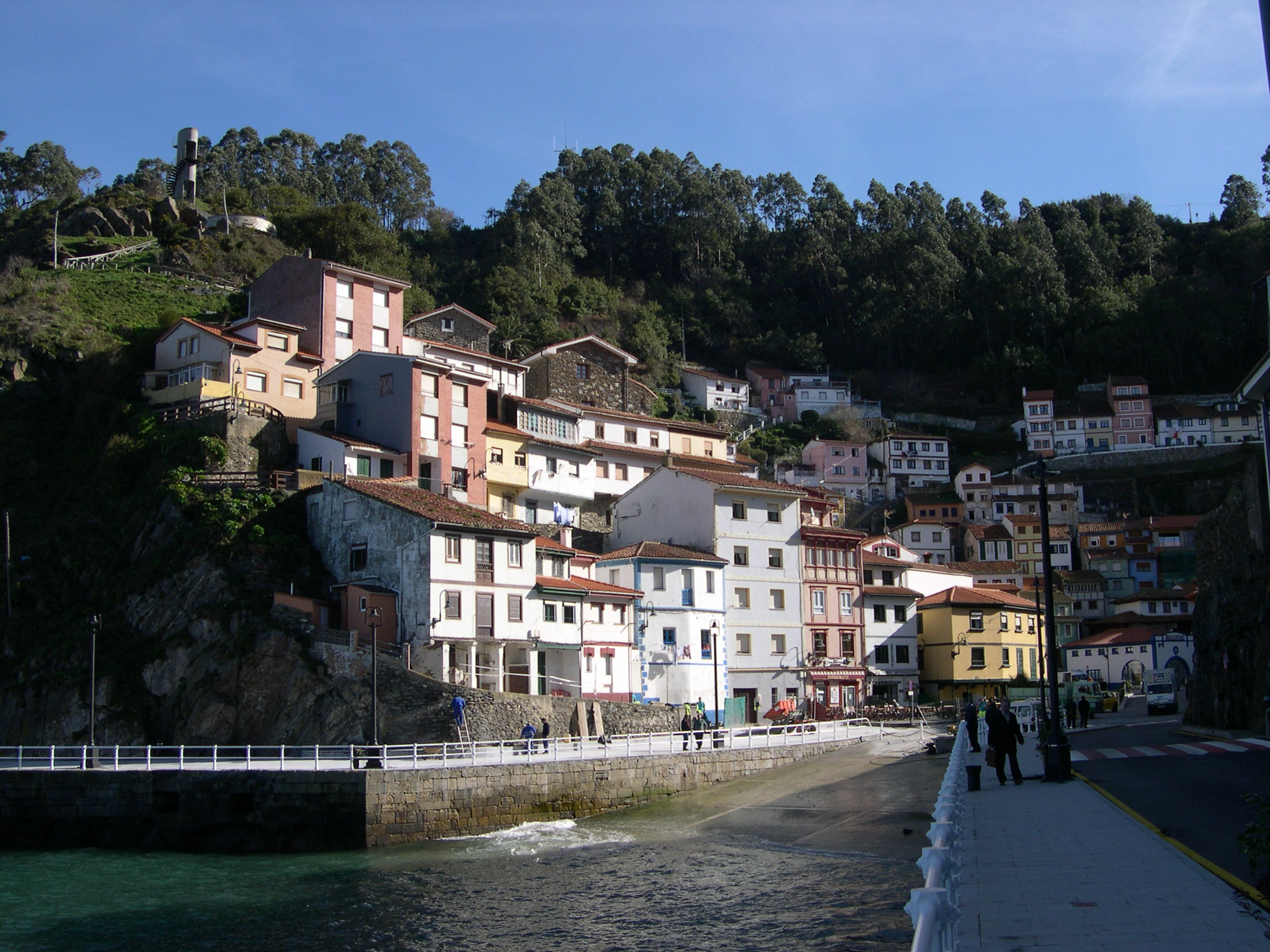 Semeya de Cuideiru - Cudillero Asturies